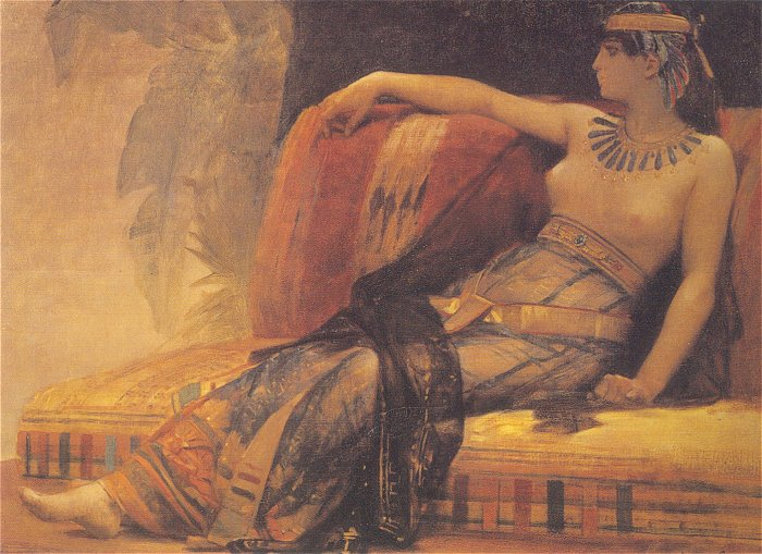 Cleopatralabel QS:Lde,"Kleopatra"label QS:Len,"Cleopatra"label QS:Lel,"Κλεοπάτρα"label QS:Lfr,"Cléopâtre (étude) par Alexandre Cabanel"label QS:Lhi,"क्लियोपाट्रा"label QS:Lhe,"קלאופטרה"label QS:Lja,"クレオパトラ7世"label QS:Lpl,"Kleopatra"label QS:Lpt,"Cleópatra"label QS:Lru,"Клеопатра"